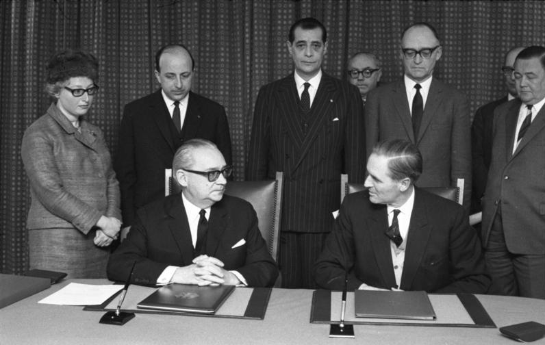 Unterzeichnung eines Abkommens über Fürsorge und Jugendwohlfahrtspflege BRD - Österreich (Unterzeichner waren: Staatssekretär des Auswärtigen Amts Prof. Carstens und der österreichische Botschafter D. Dr. Schöner)